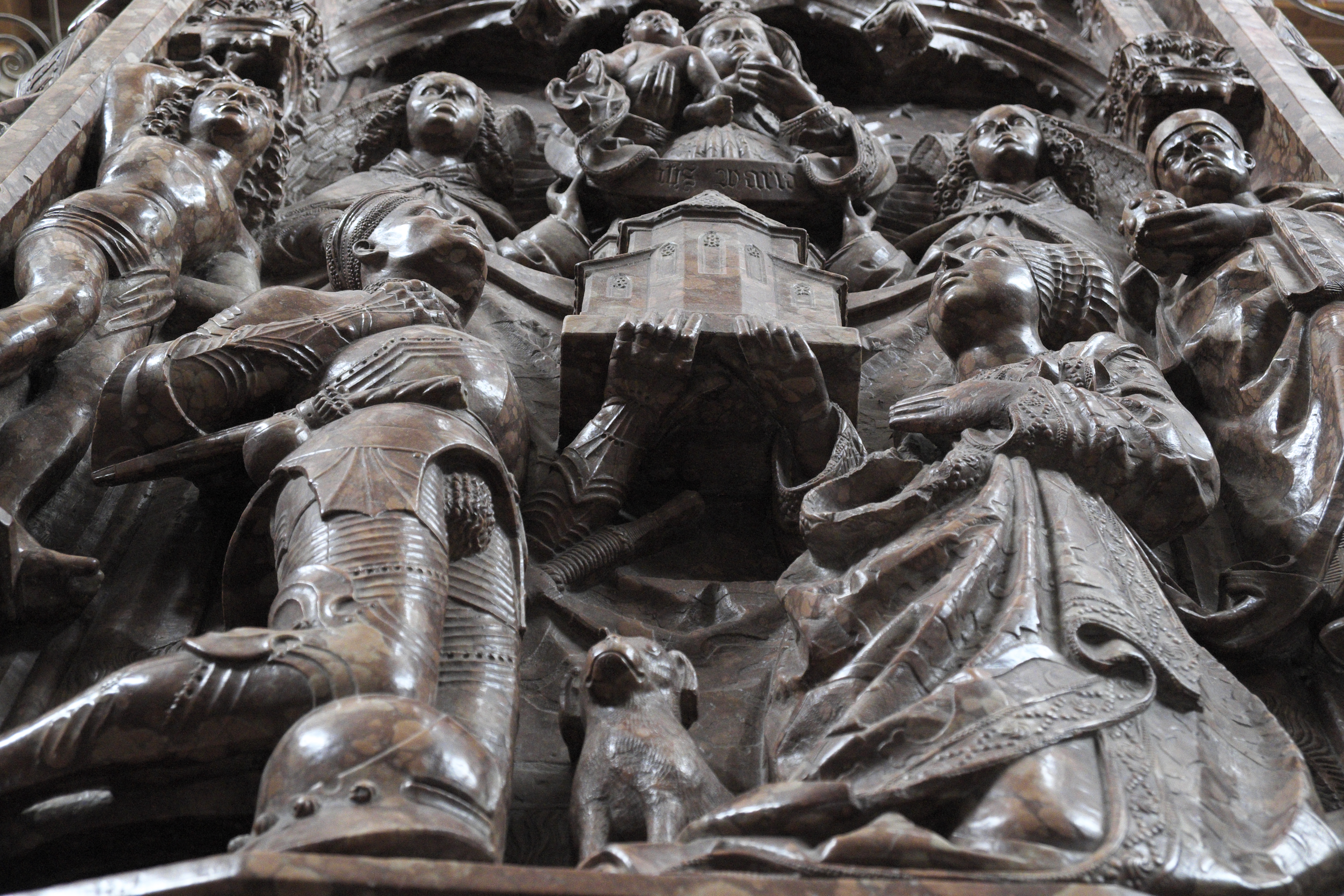 Katholische Pfarr- und Wallfahrtskirche St. Sebastian in Ebersberg (Bayern/Deutschland), Stifterhochgrab für Graf Ulrich von Ebersberg und seine Gemahlin Richardis von Kärnten, von Abt Sebastian Häfele (1472–1500) in Auftrag gegeben, von Wolfgang Leb geschaffen und nach 1500 aufgestellt